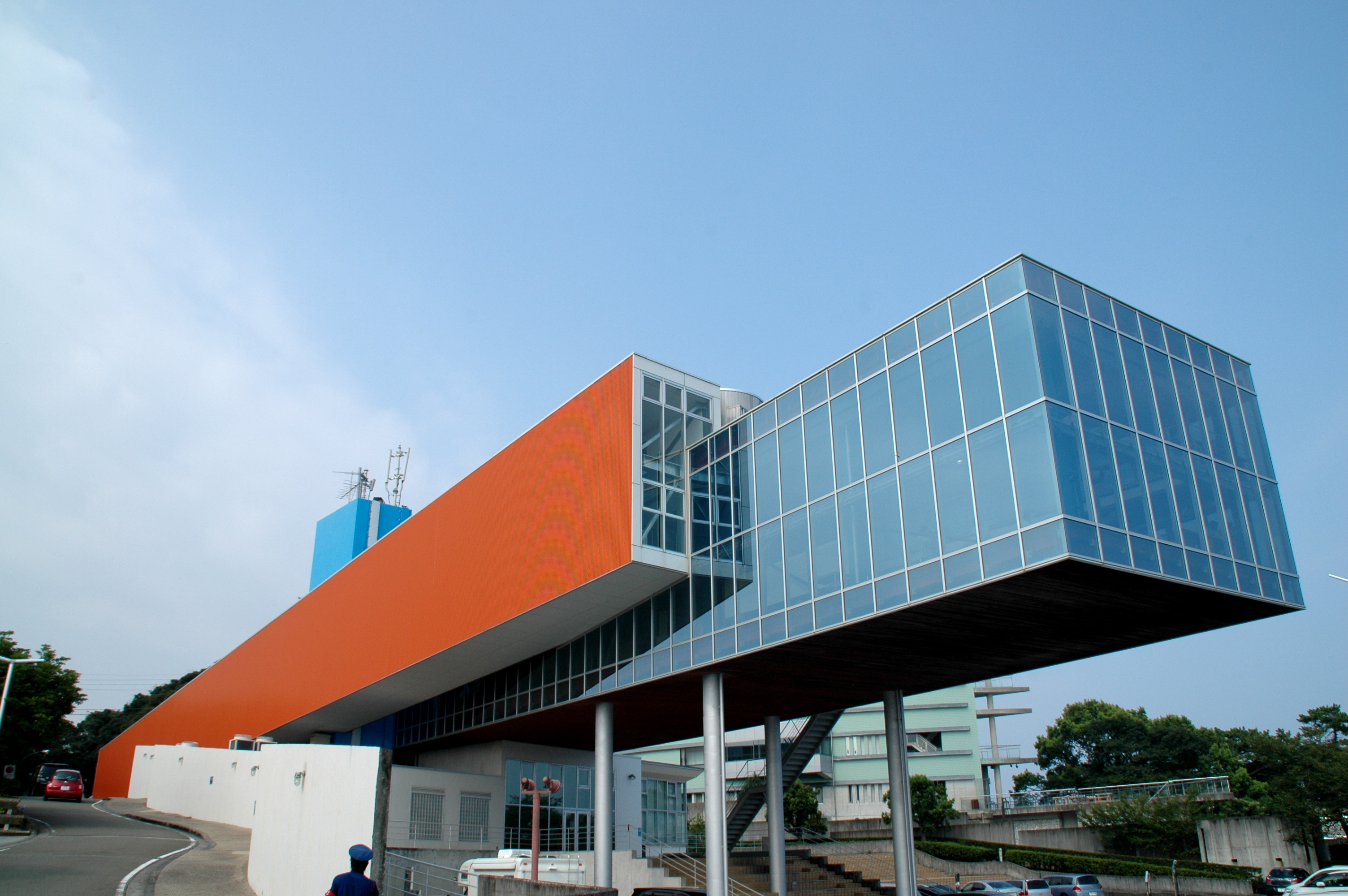 海側から見た高知県立坂本龍馬記念館。